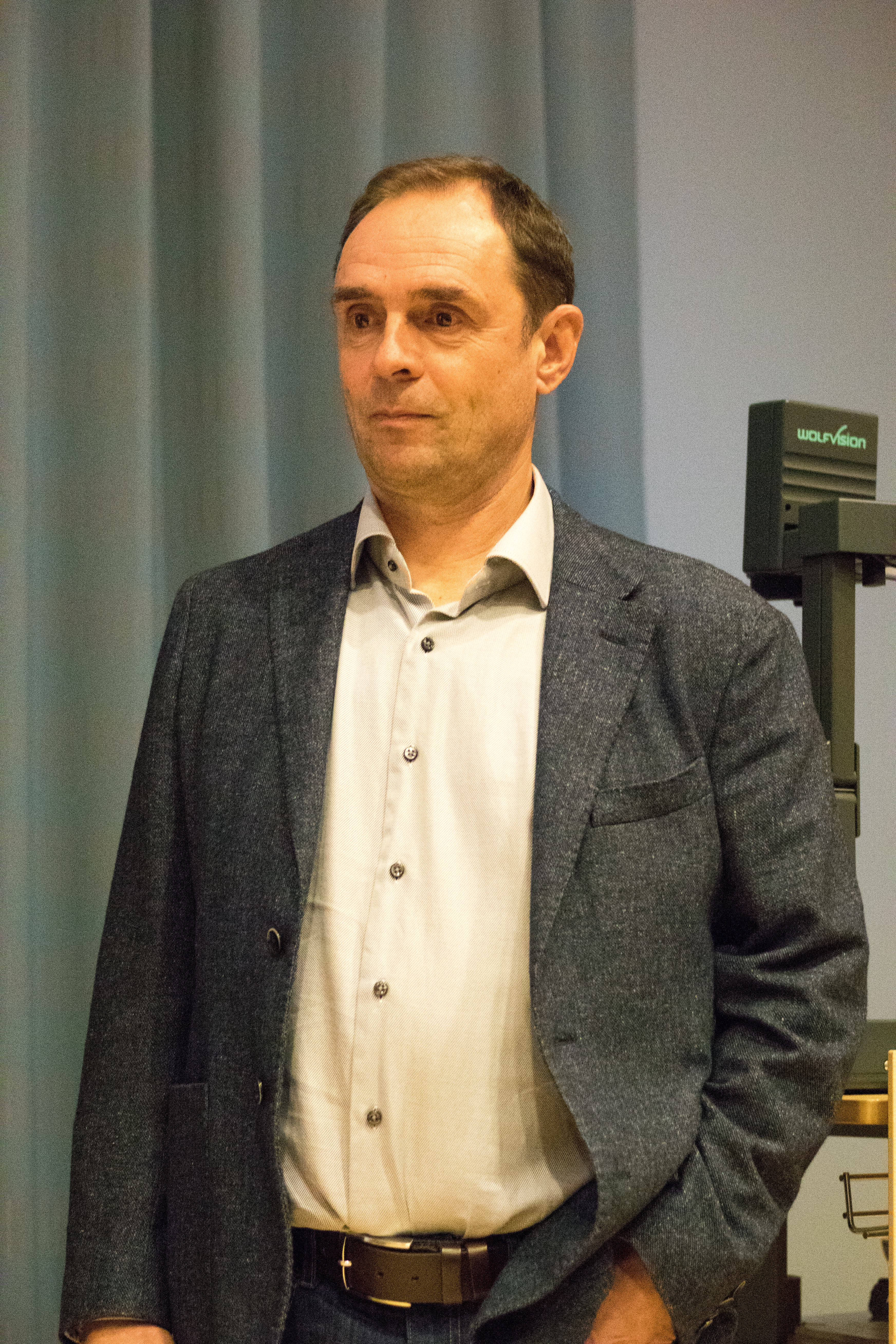 Markus Varesvuo suomalainen luontokuvaaja